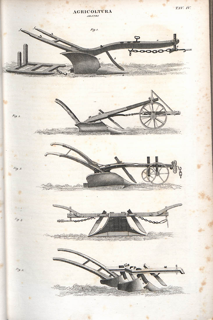 Aratro tratto da Nuova enciclopedia popolare. 13